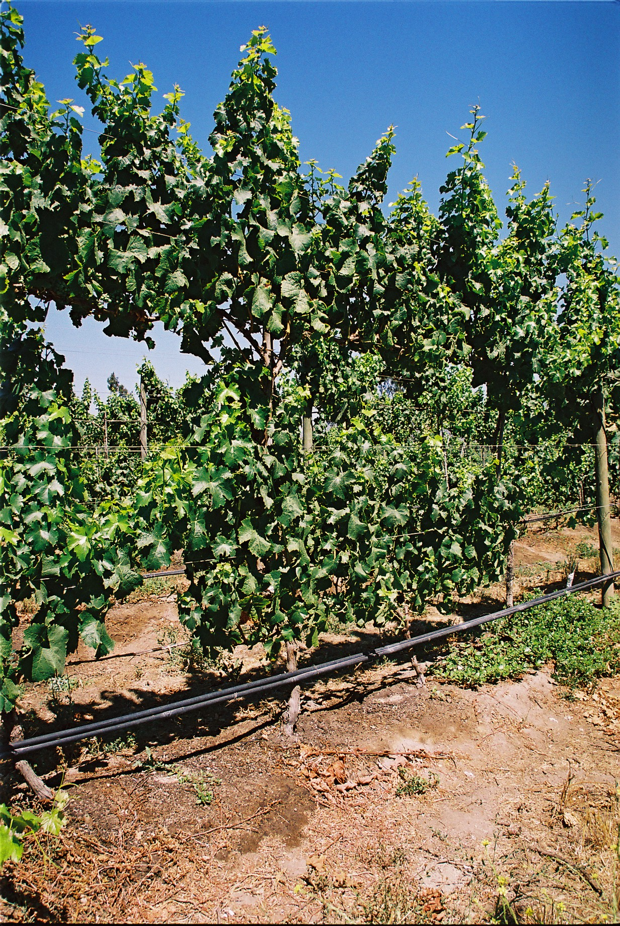 Reberziehungssystem - Te Kauwhata_Two_Tier_TK2T